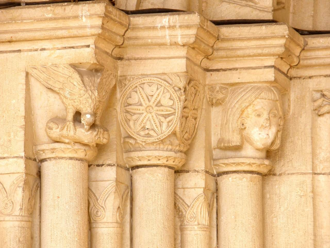 Iglesia de San Martín, Otazu (Álava)